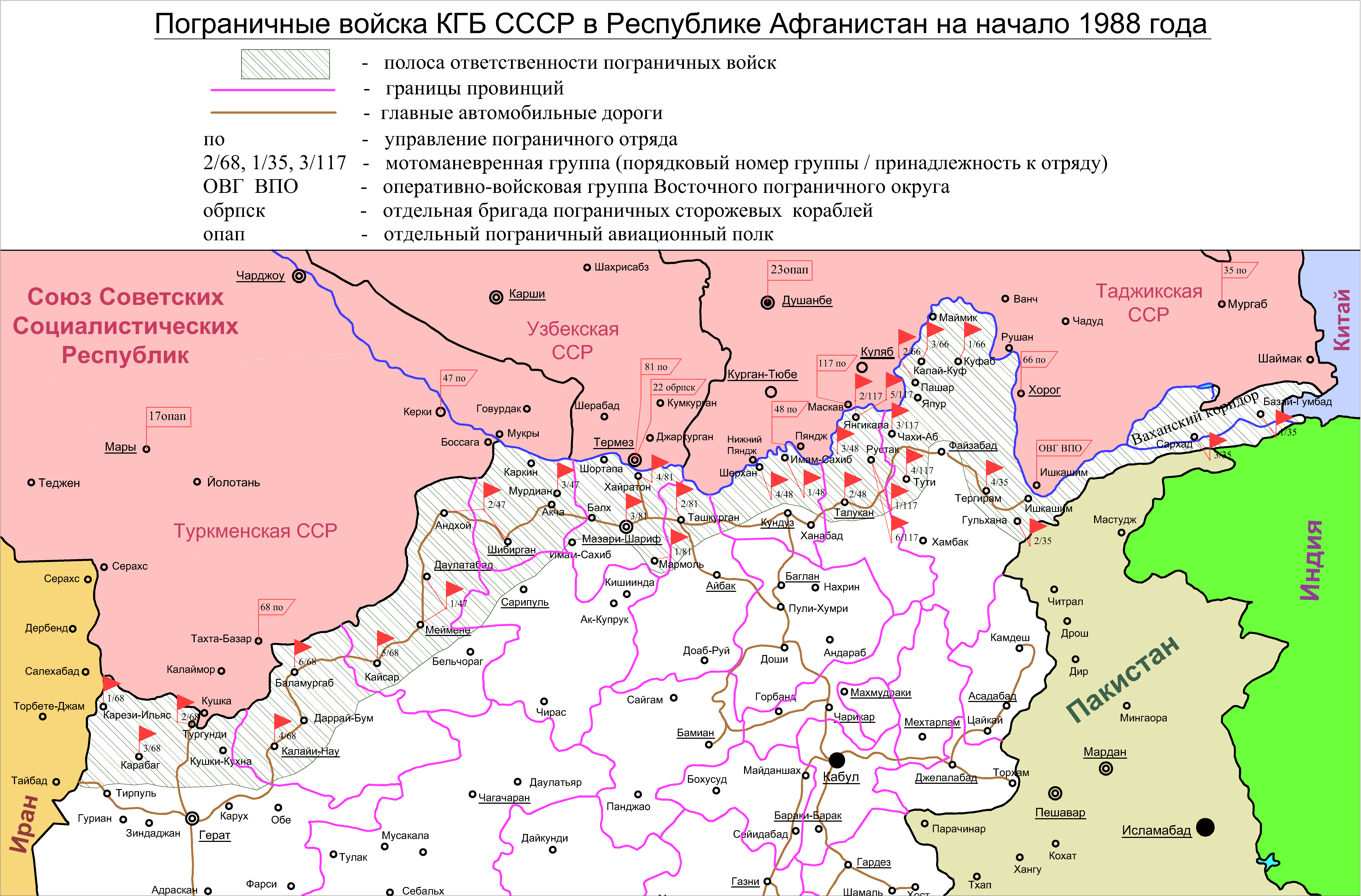 Пограничные войска КГБ СССР в Республике Афганистан на начало 1988 года. Карта составлена на сведениях из сайта и